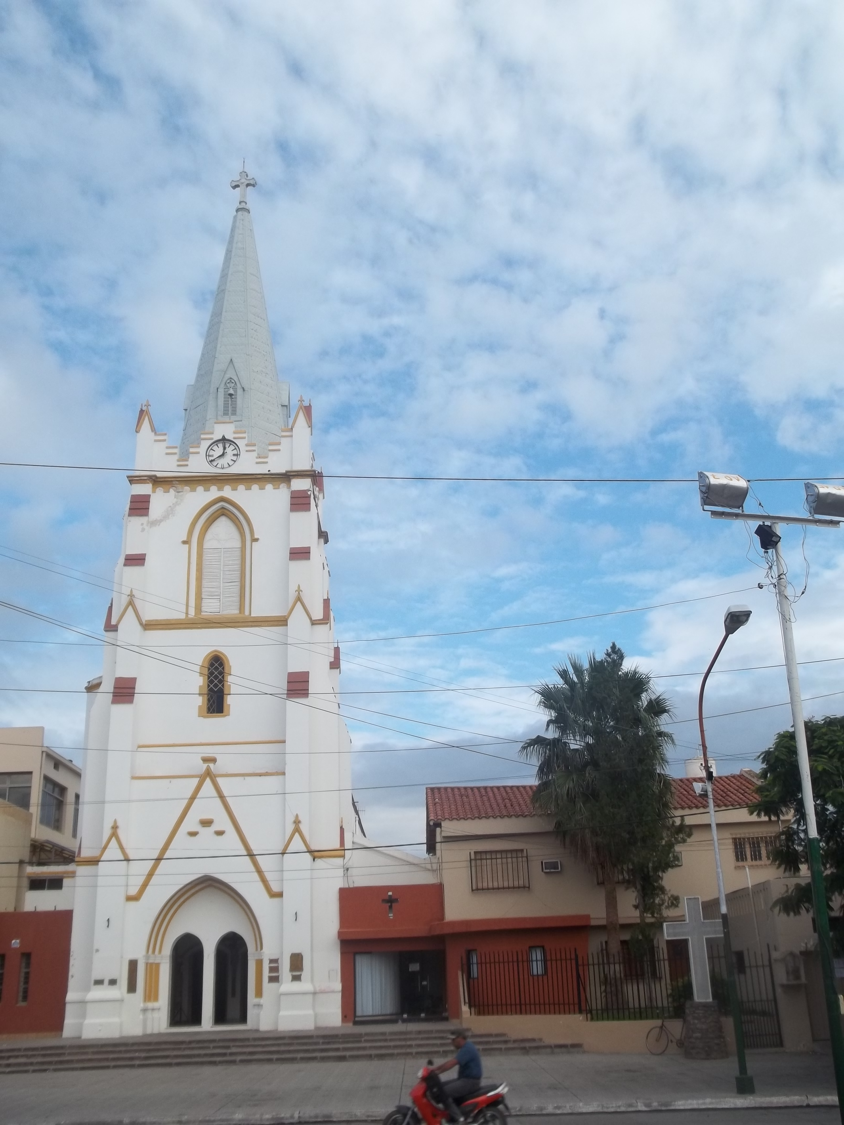 Principal templo católico de la ciudad de San Pedro de Jujuy, frente a la plaza Belgrano.